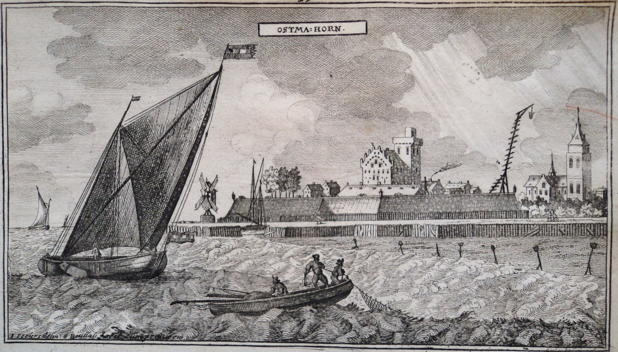 Gravure van Oostmahorn rond 1674. Uit het boek: Bouttats, G. & I. Peeters (1674), Thooneel der Steden ende Sterckten van t' Vereenight Nederlandt met d'aengrensende Plaetsen soo in Brabandt Vlaenderen als anden Rhijn en elders verovert door de Waepenen der Groot-moghende Heeren Staeten onder het gheley vande seer Edele.